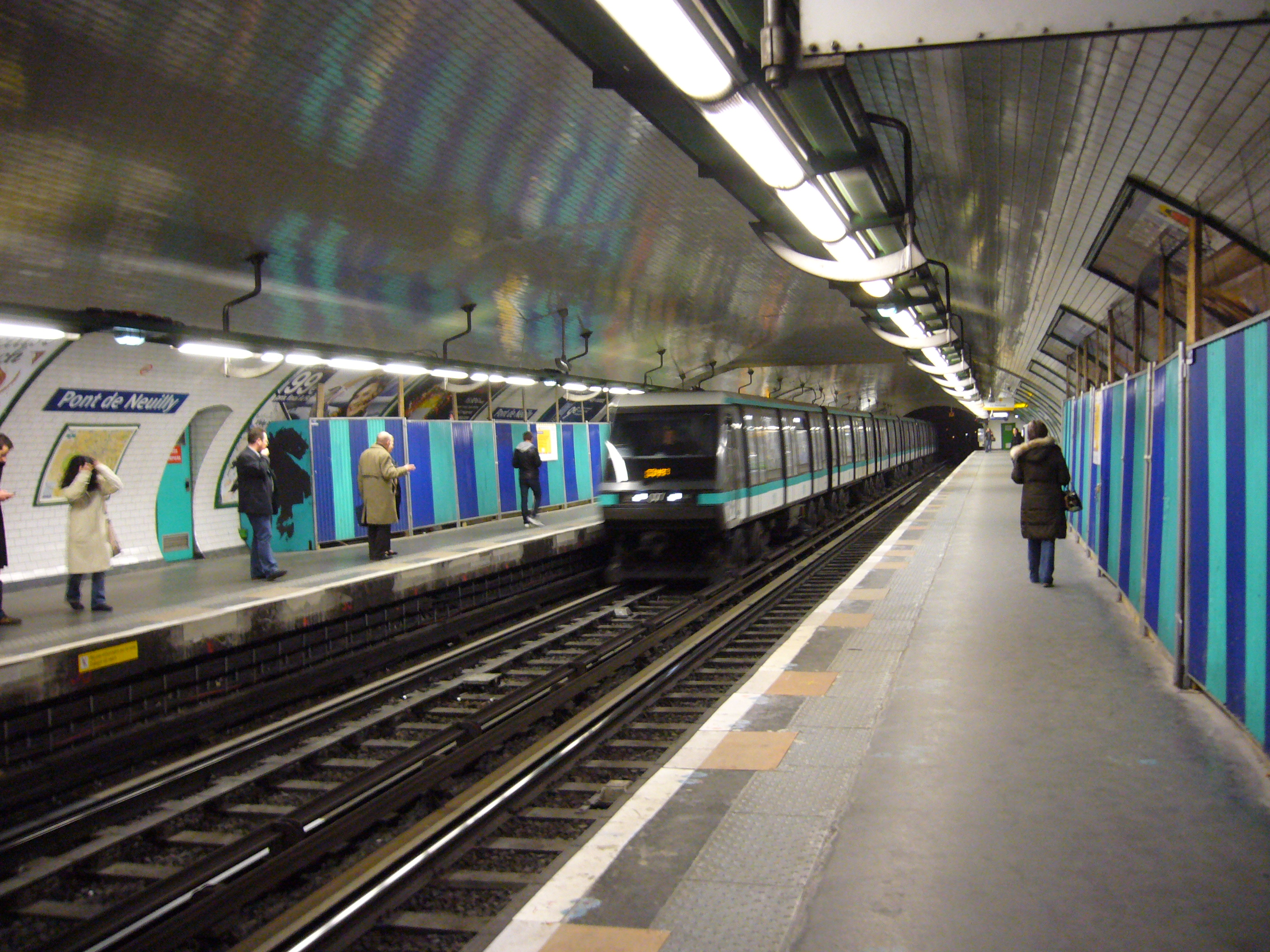 Un MP 89 arrive à quai à la station Pont de Neuilly sur la ligne 1 du métro de Paris.